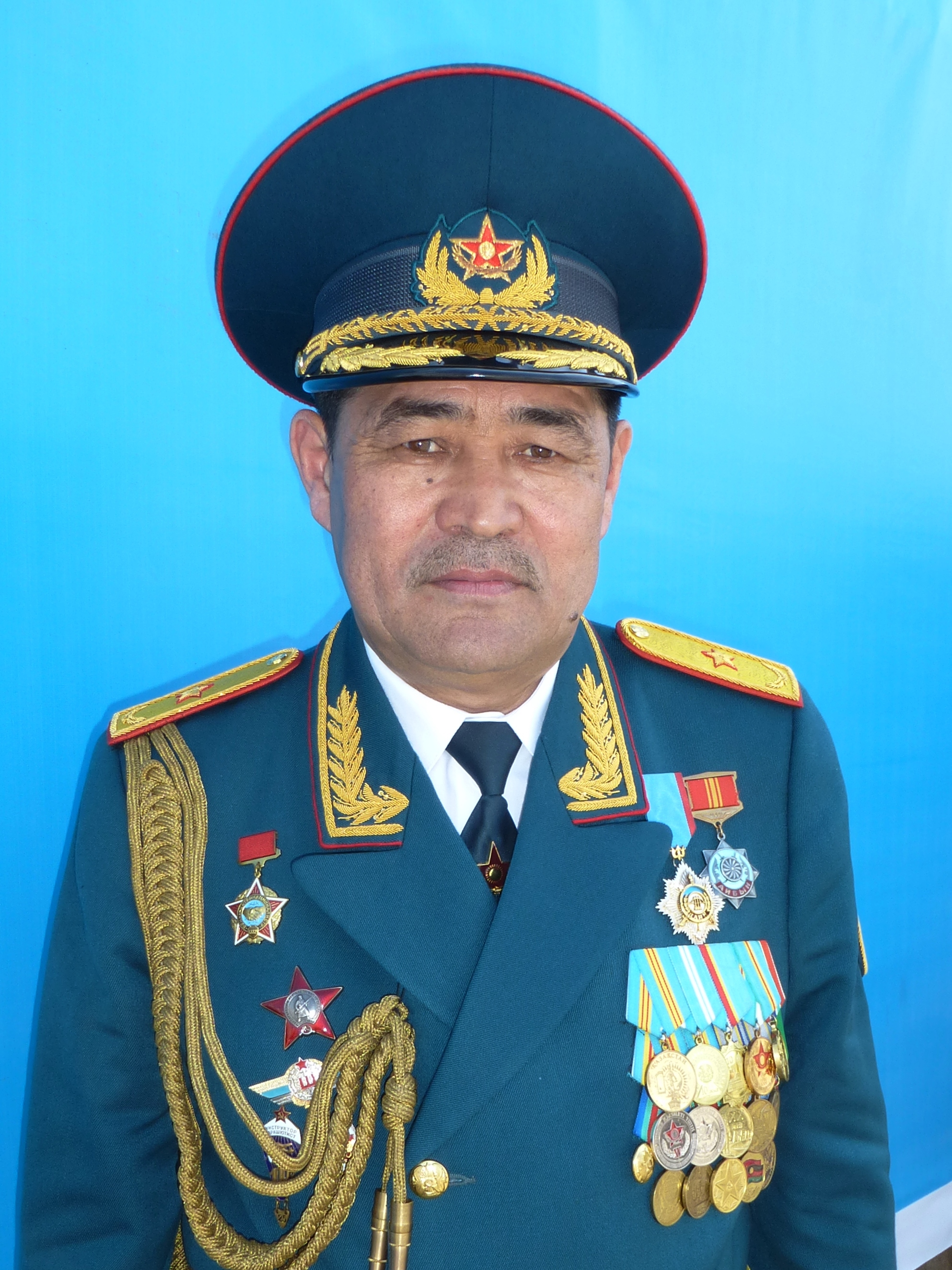 Алдабергенов Адылбек Калибекович. Генерал-майор